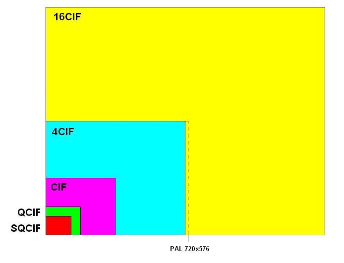 CIF formats